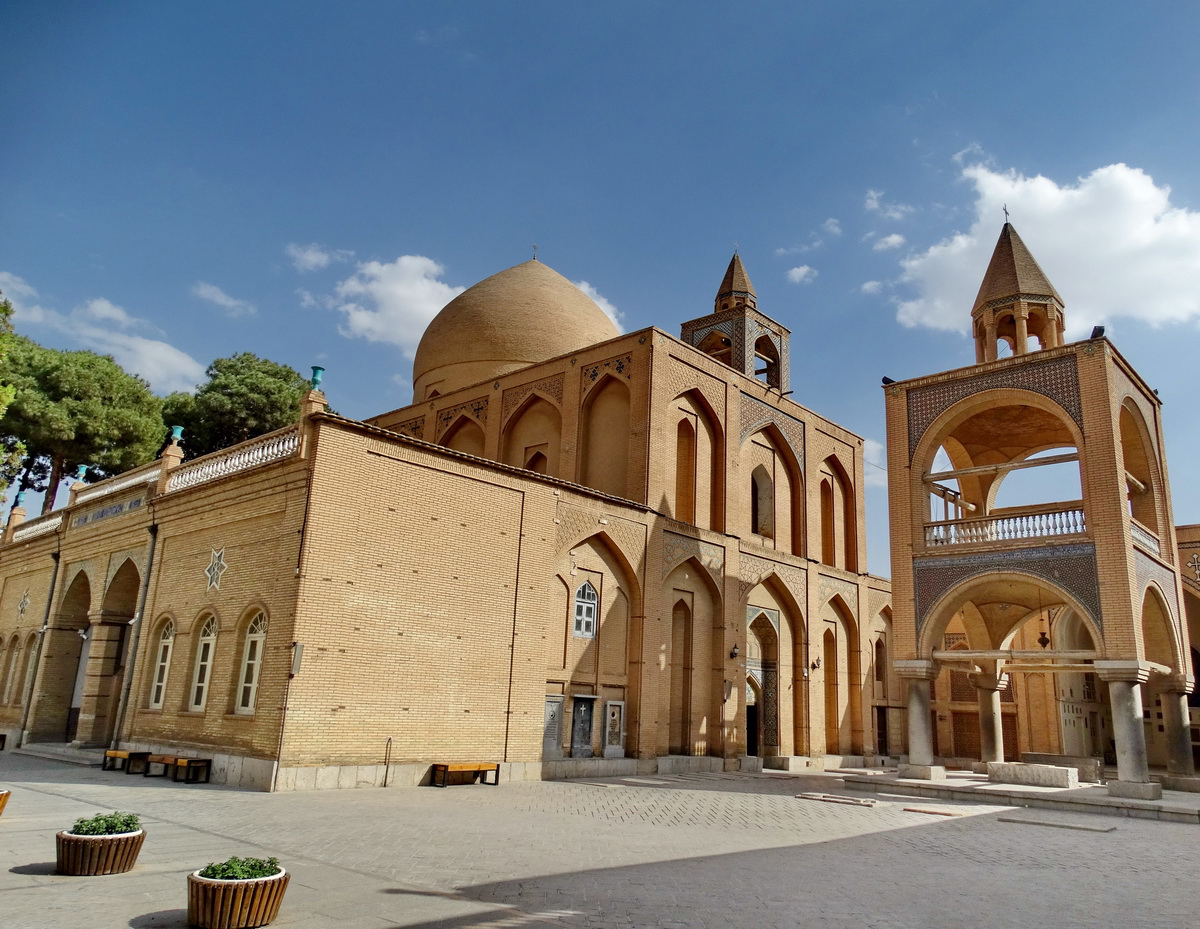 کلیسای وانک. عکس Rasool AB